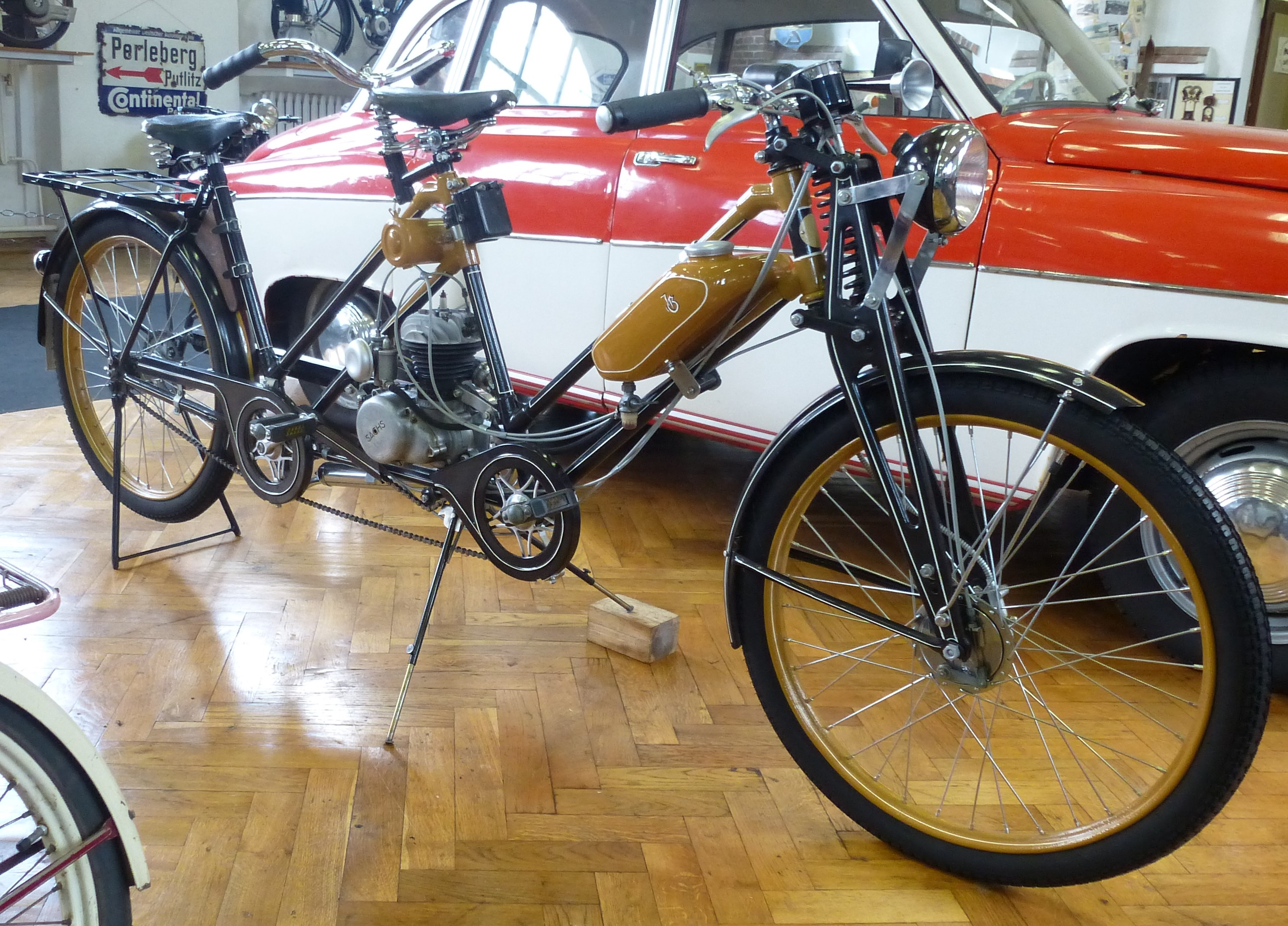 Cito Tandem-Motorrad 11935